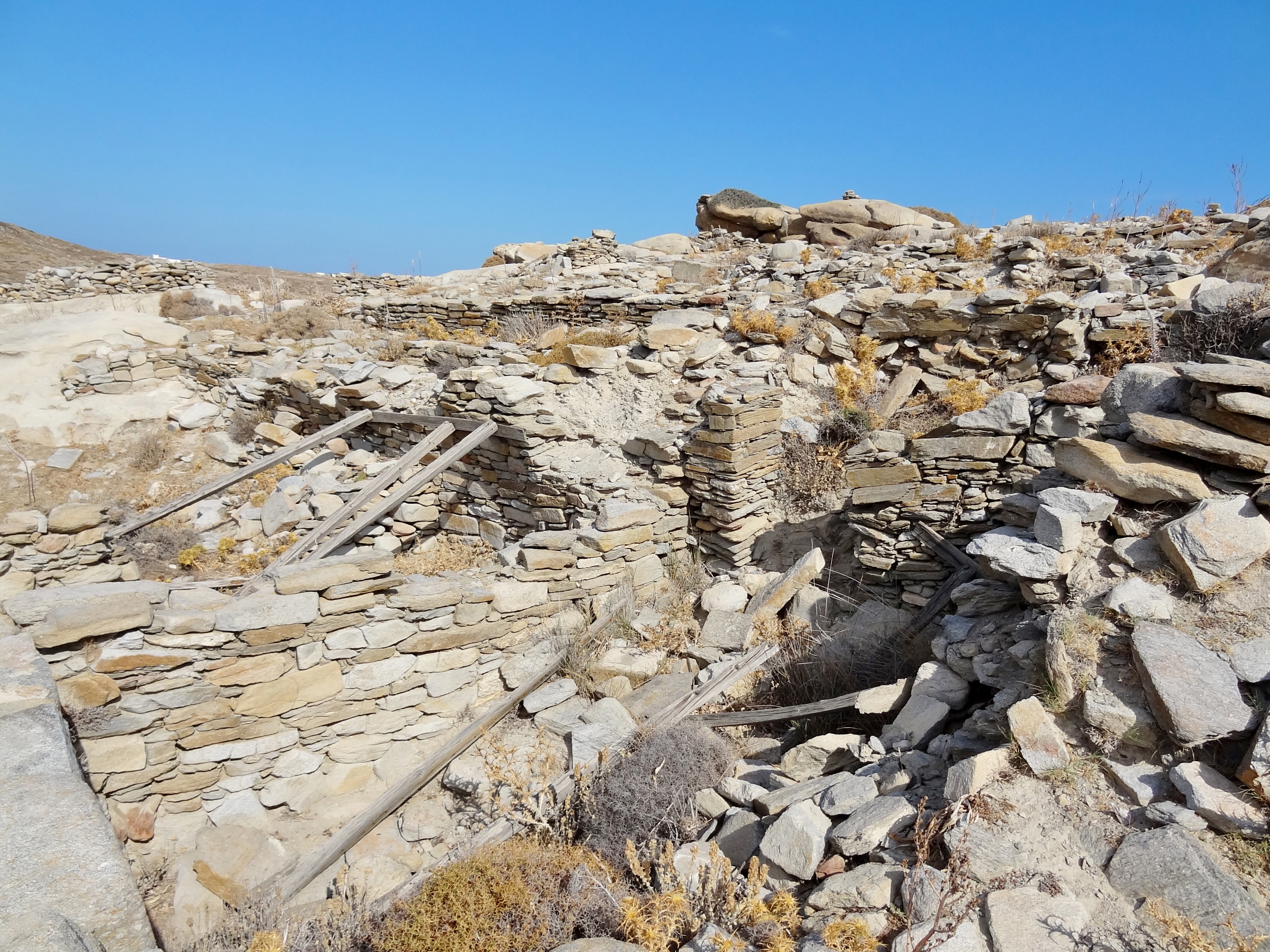 Mykenischen Akropolis von Koukounaries bei Naousa auf Paros, Kykladen, Griechenland